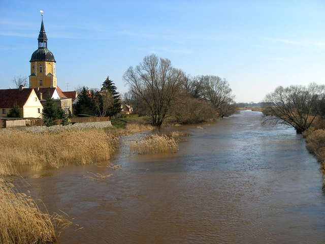 Jessen-Schweinitz an der Schwarzen Elster, 16 km von Wittenberg, Deutschland (Zone 33). Jessen-Schweinitz, Blick von der Straßennbrücke (Torgauer Straße) auf die Schwarze Elster und die Kirche Sankt Marien